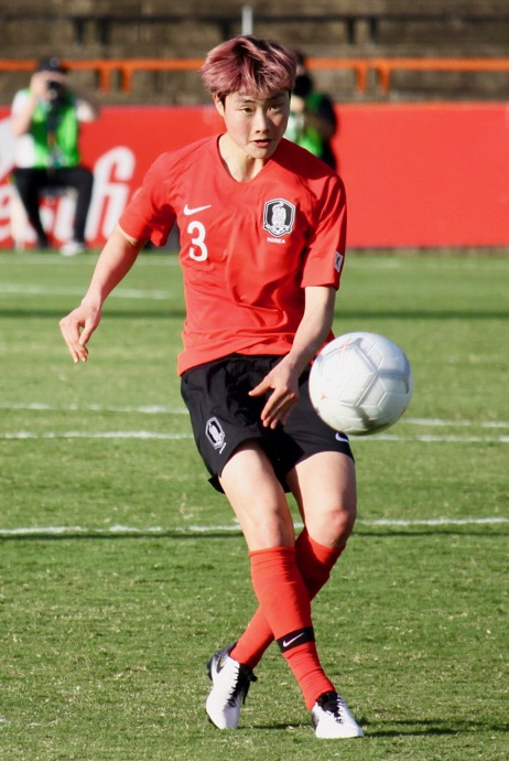 KorArg - HongHye-jiKick5